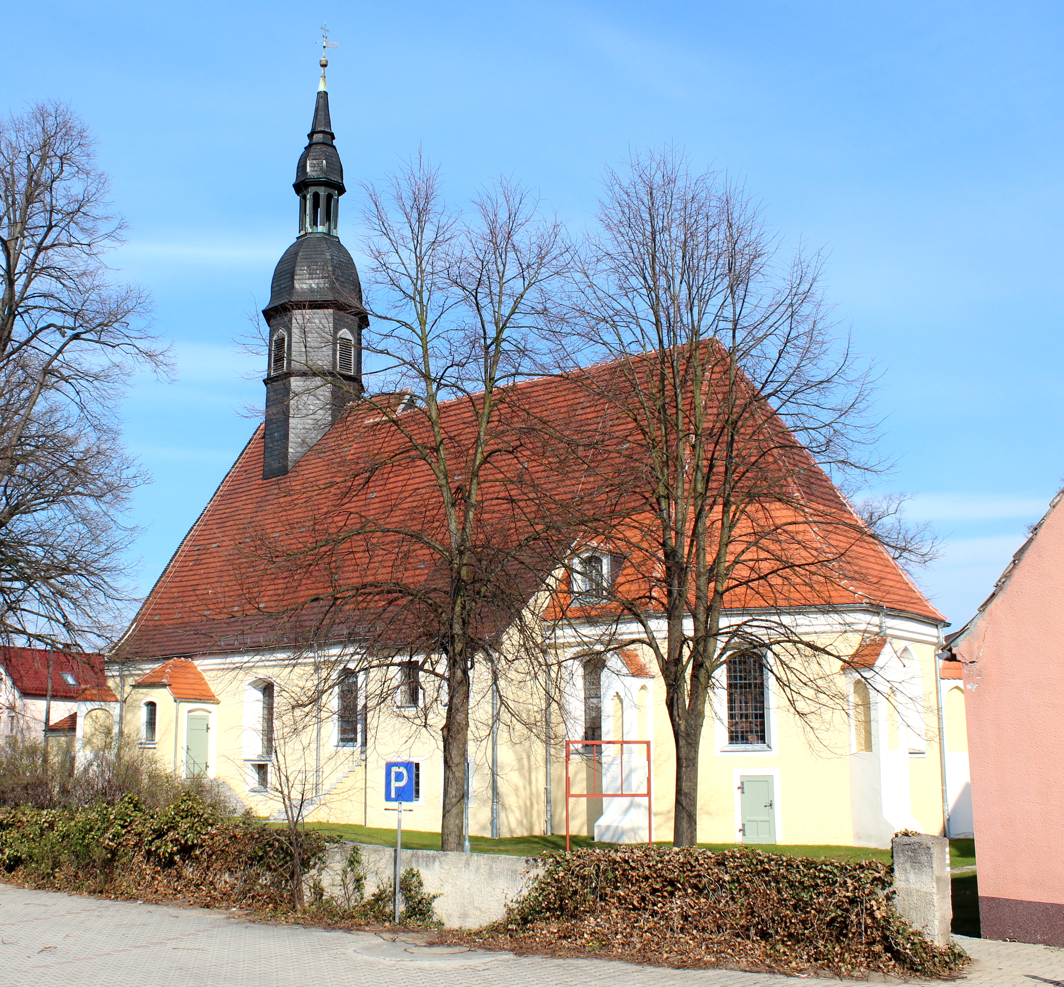 Dorfkirche in Frauenhain (Röderaue)